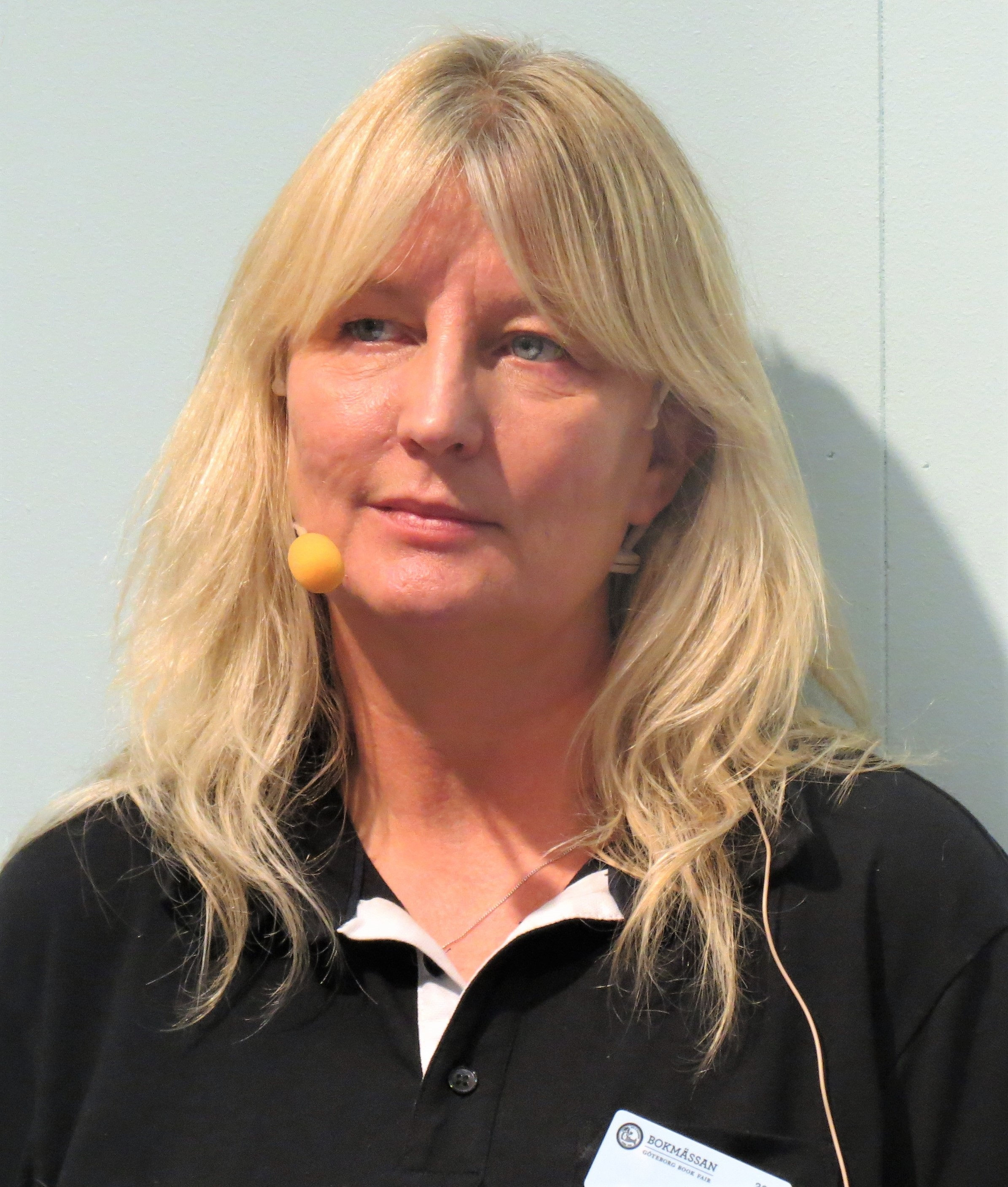 Karin Smirnoff under en intervju i Lunds universitets monter på Bokmässan i Göteborg 2019.